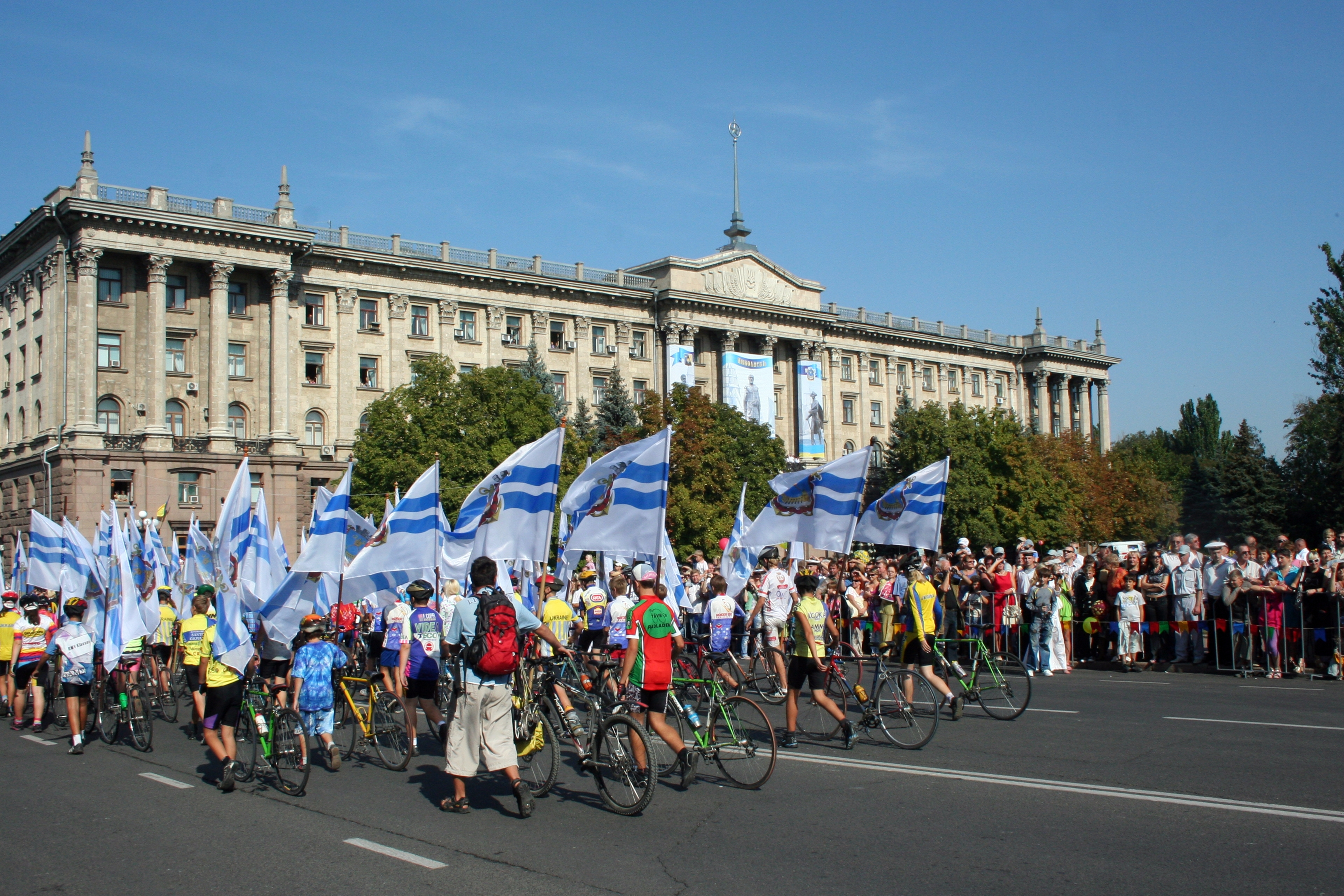 Адміністративна будівля, Миколаїв, вул. Адміральська, 20